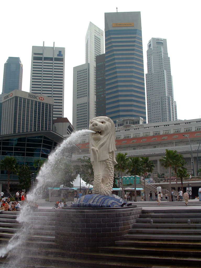 Merlion in Singapur